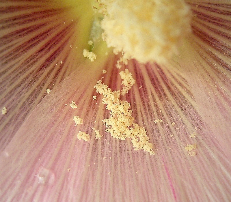 Alcea rosea